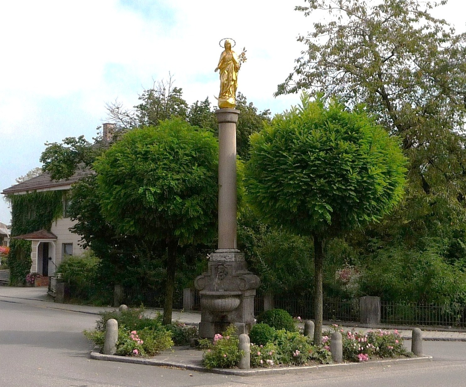 Die 1905 eingeweihte Mariensäule in Kienberg